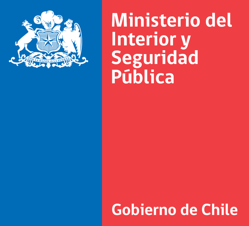 Logo del Ministerio del Interior y Seguridad Pública.